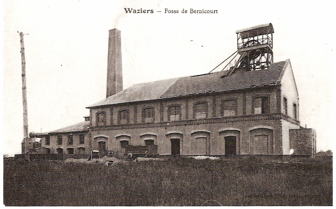 Fosse Bernicourt de l'ancienne Cie d'Aniche